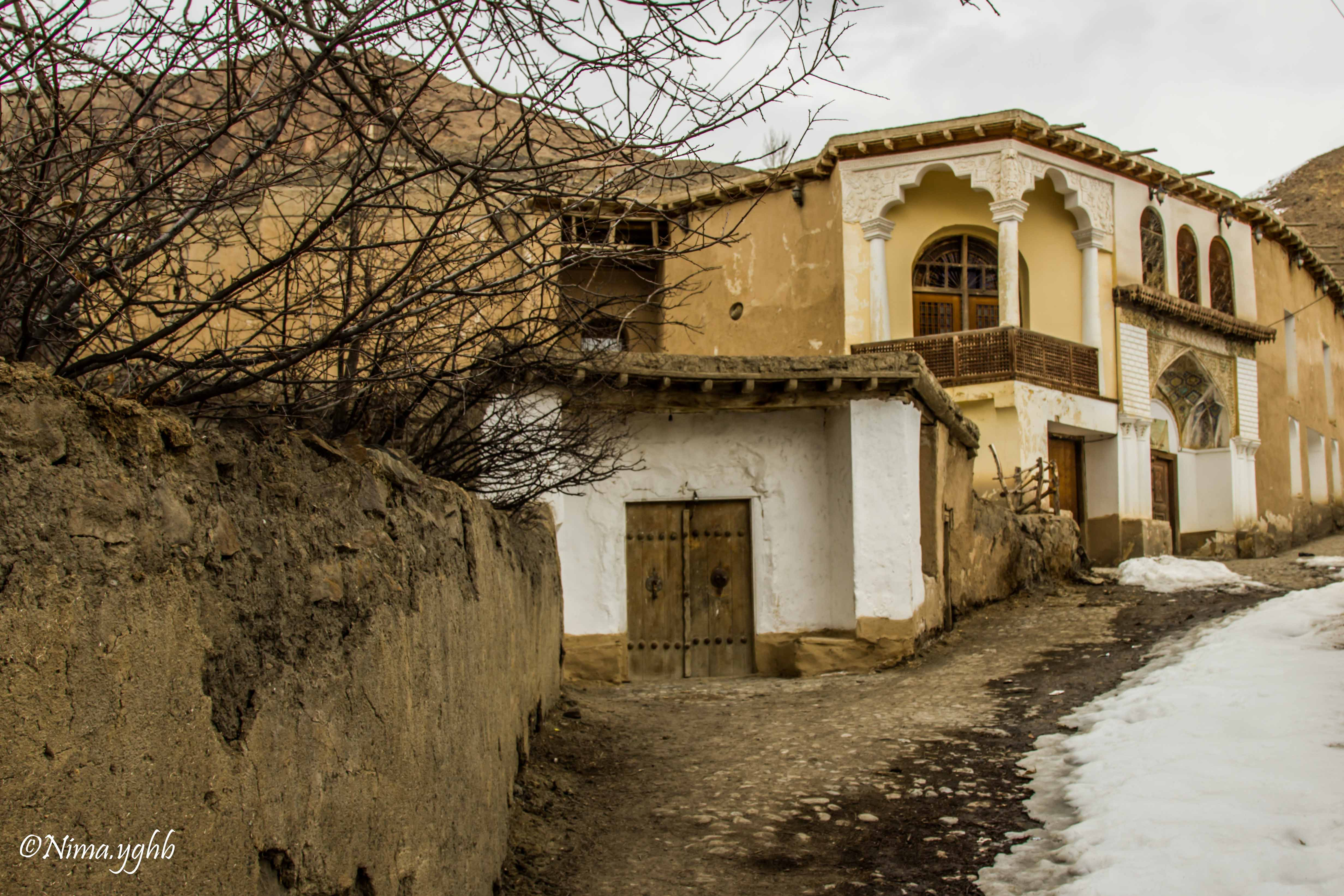 خانه نیما یوشیج